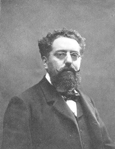 Fotografía de Leonci Soler y March, presidente de la Lliga Regionalista y diputado por Manresa, obra de Pablo Audouard.